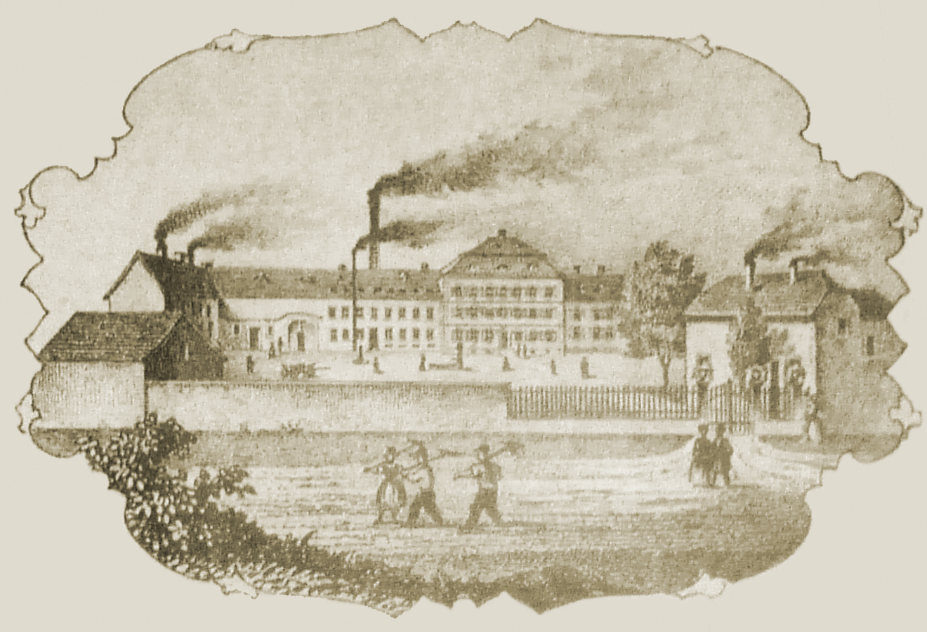 Pappmachéfabrik Ensheim 1839